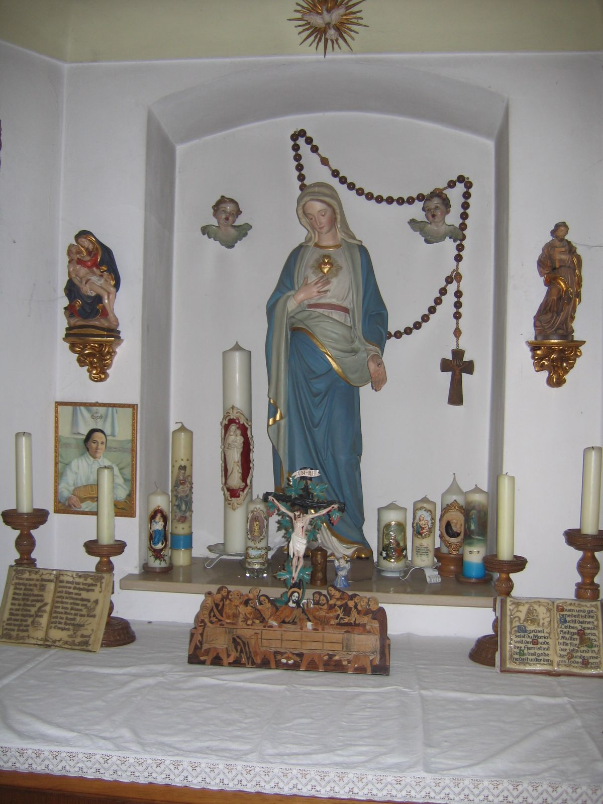 Das Kapelleninnere von Hardt